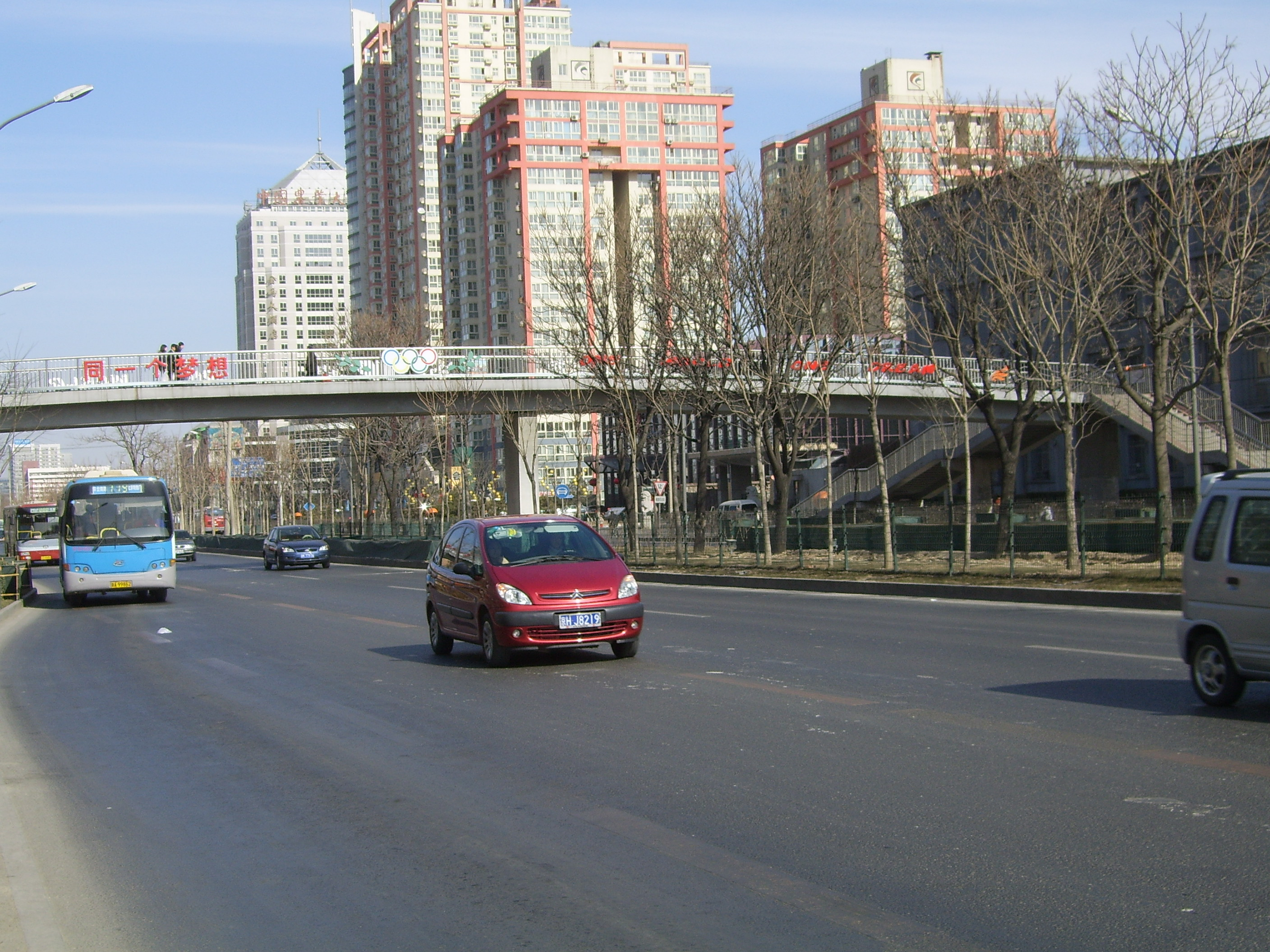 北京学院路一景，照片中的高楼为富润家园